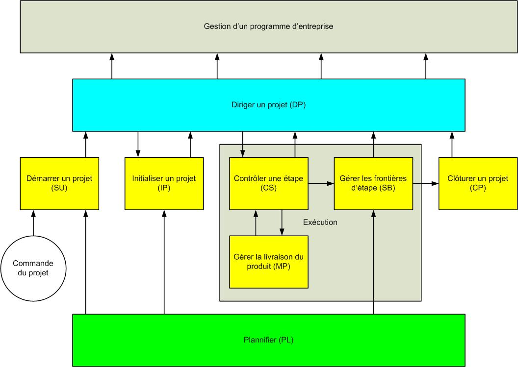 Schéma d'ensemble des processus Prince2 Domfou